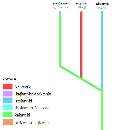 Razvitak i seobe govora Slunja